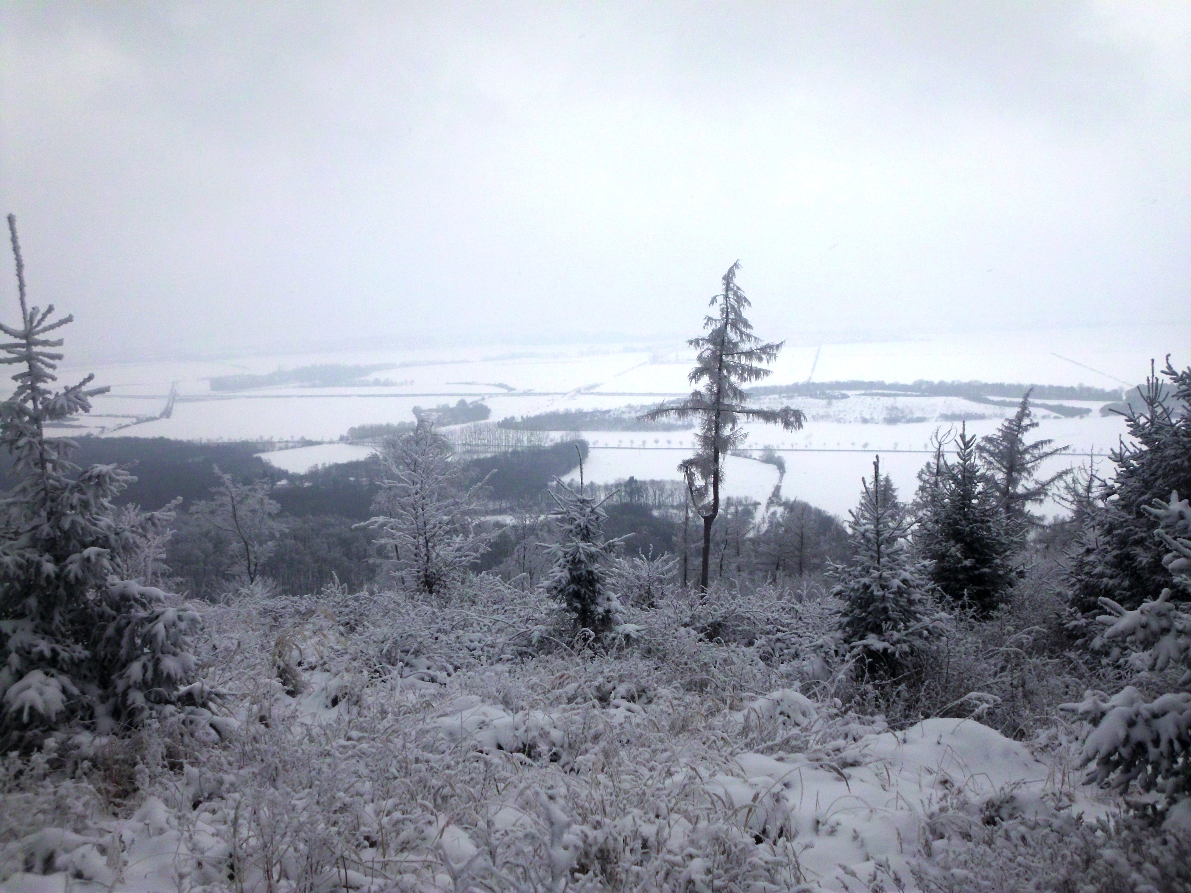 Blick vom Stapenberg, Benzingerode, Stadt Wernigerode